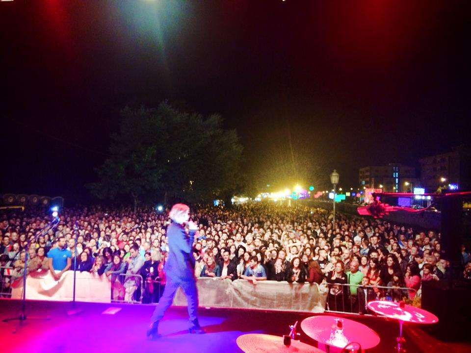 Il concerto dell'artista Irene Grandi al lungofiume boulevard di Cosenza edizione 2014